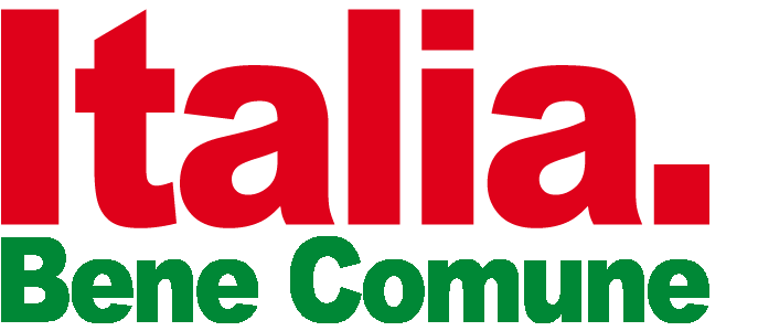 Logo della coalizione di centrosinistra Italia. Bene Comune